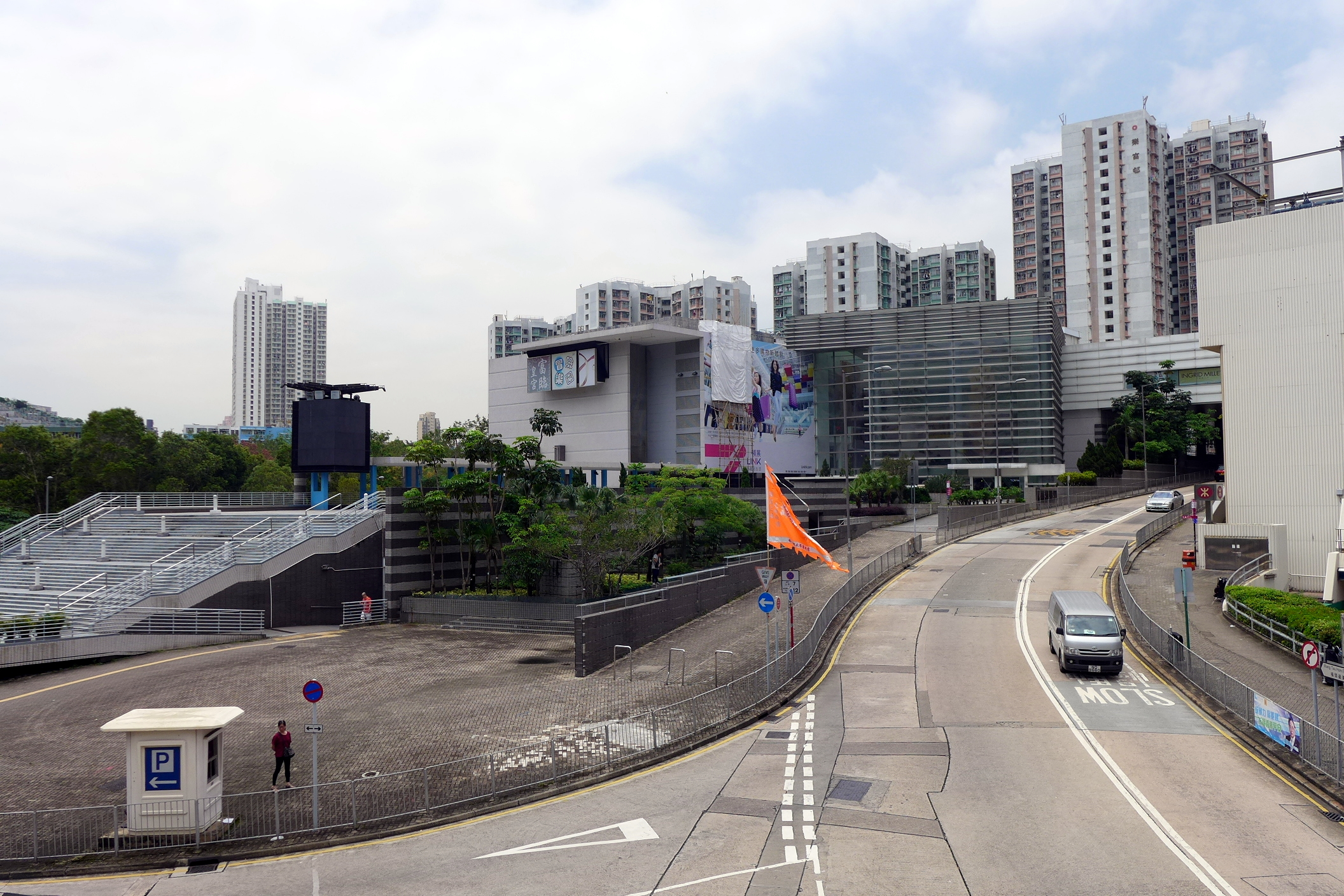 Lok Fu Plaza Phase 2 Outside view